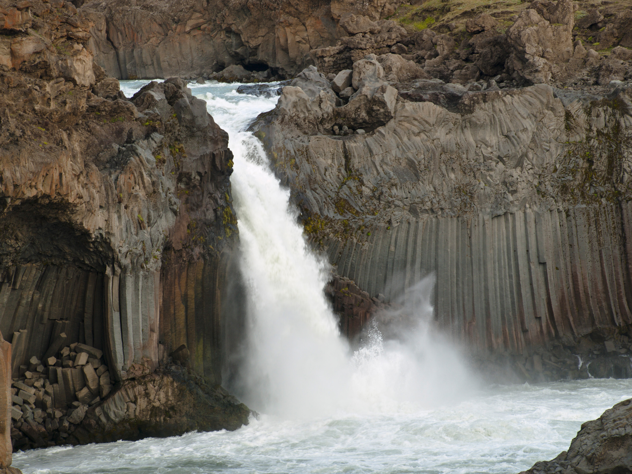 Gengið meðfram Skjálfandafljóti 10.-15. ágúst 2009.